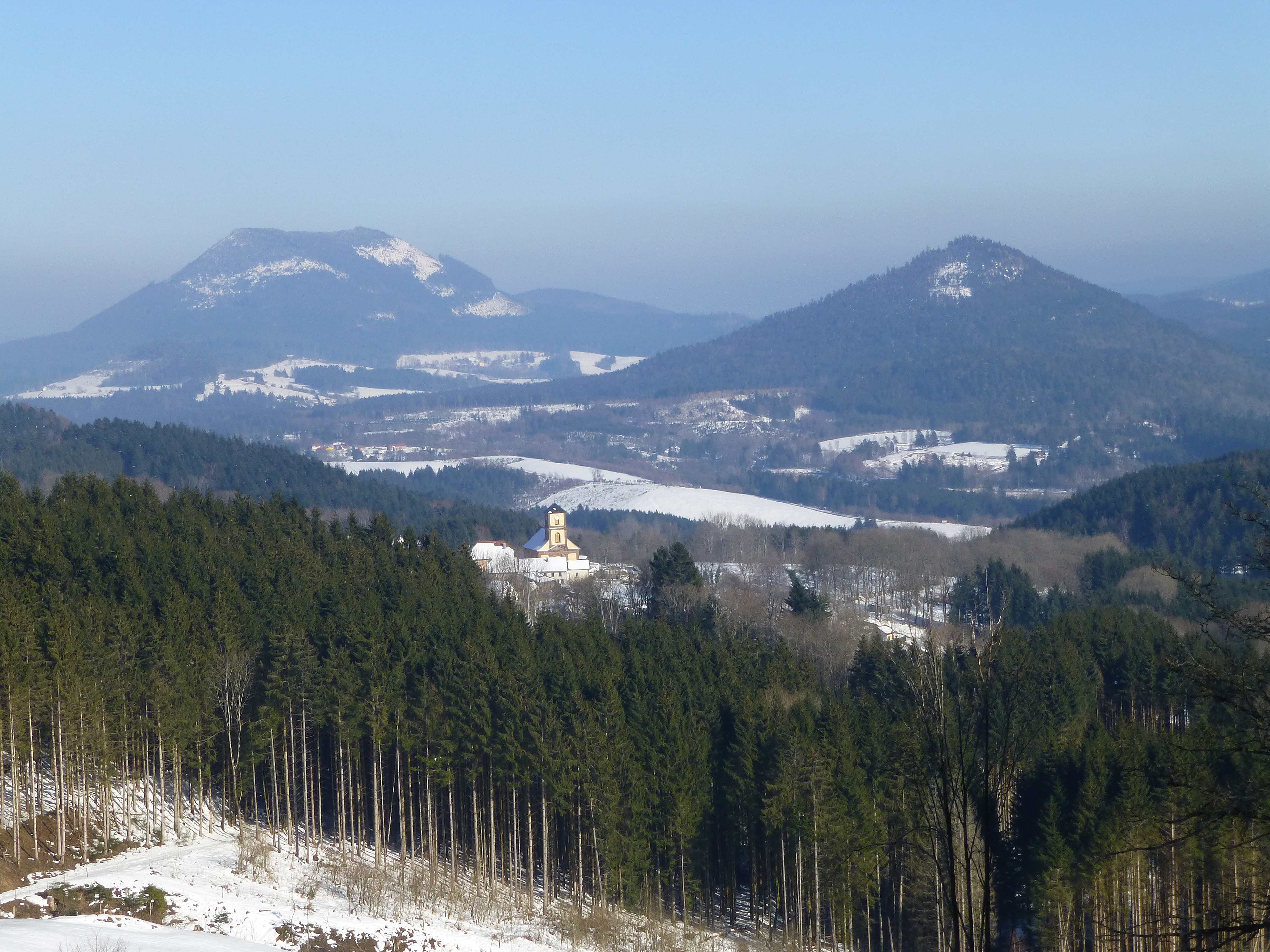 Le Climont, le Voyemont et l'église de la Grande-Fosse (Vosges), depuis le col du Las